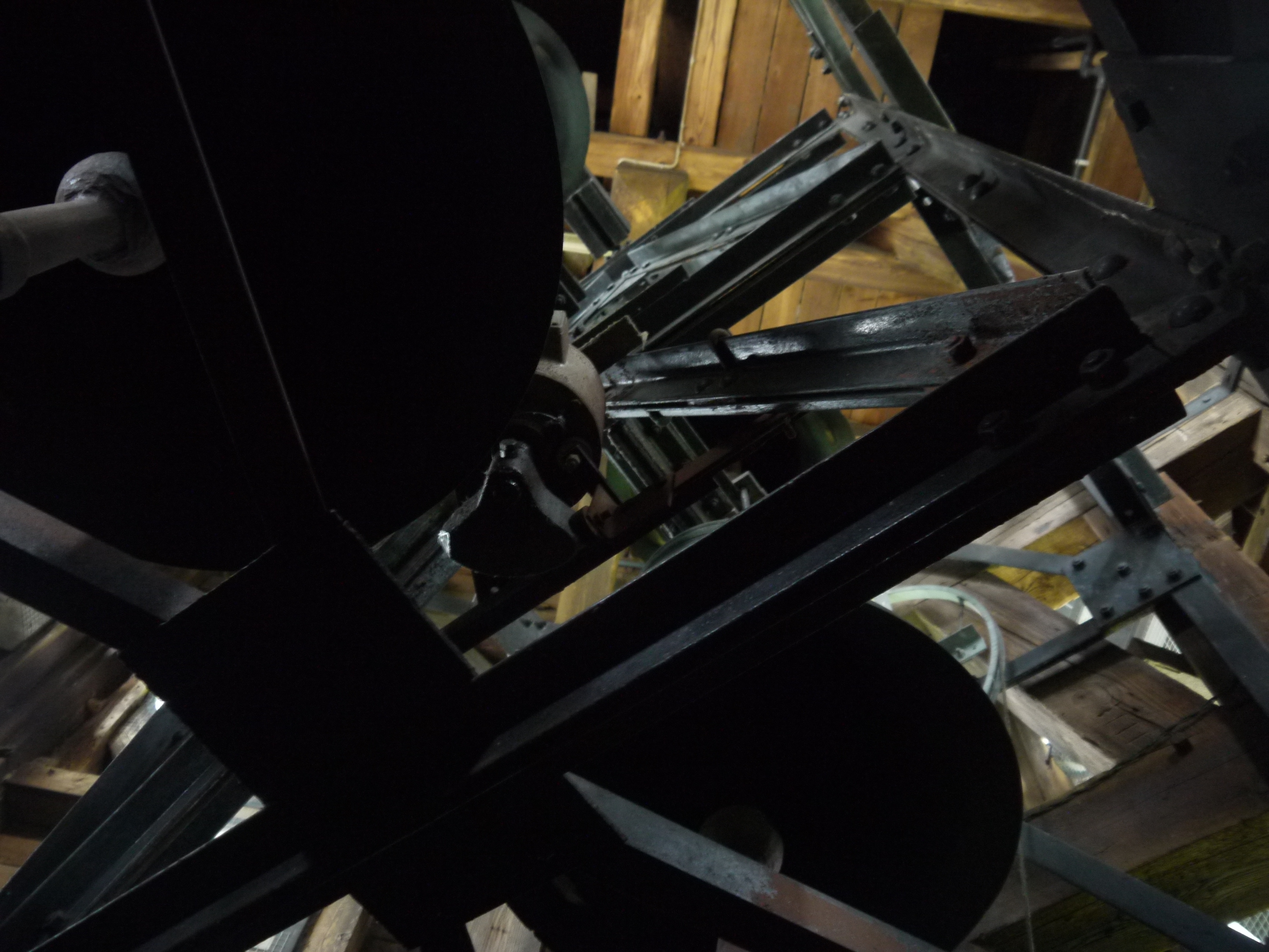 Die Glocken im Dachreiter des Altenberger Doms